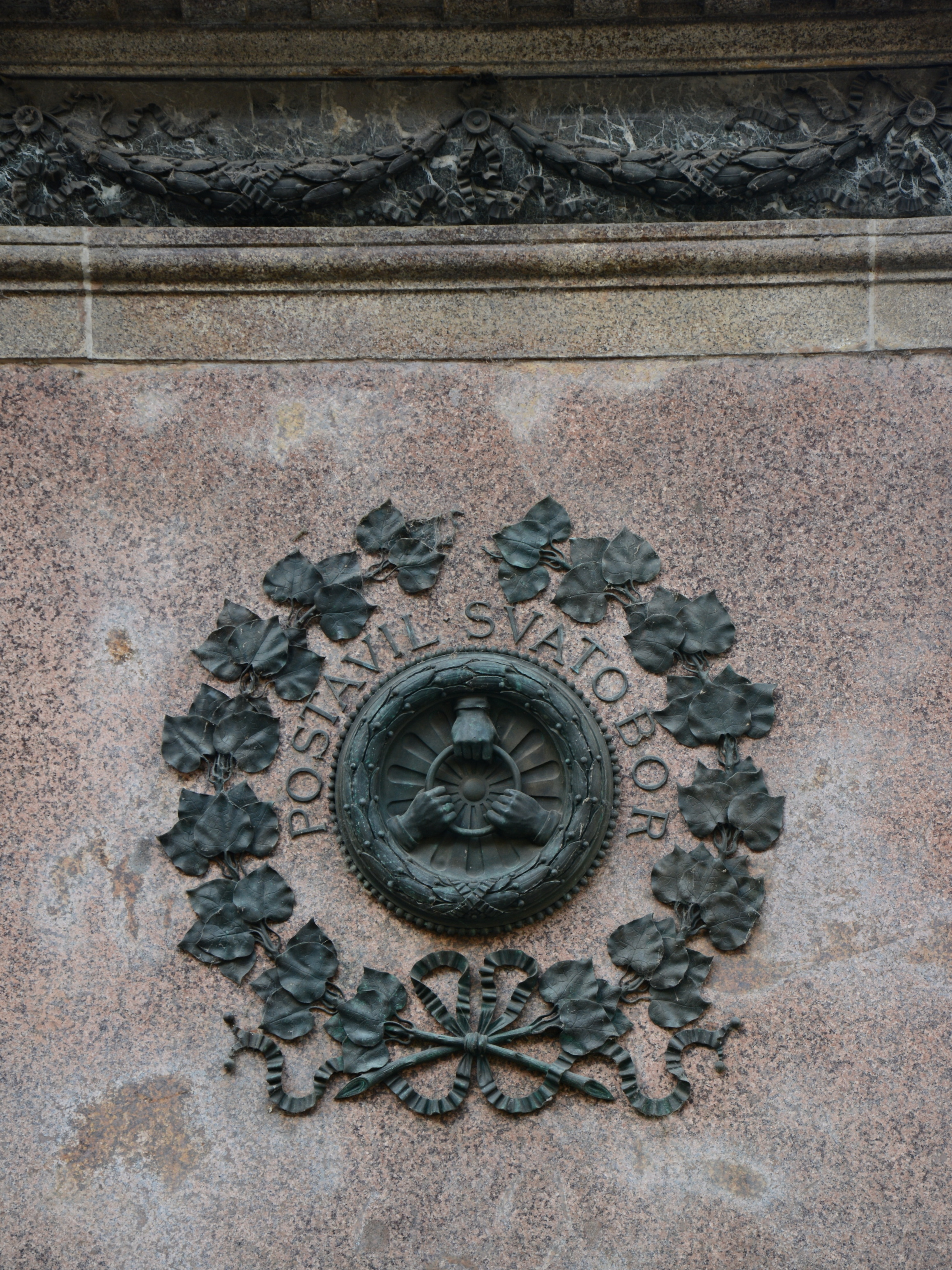 Pomník Josefa Jungmanna, Praha 1 - Nové Město, Jungmannovo náměstí.